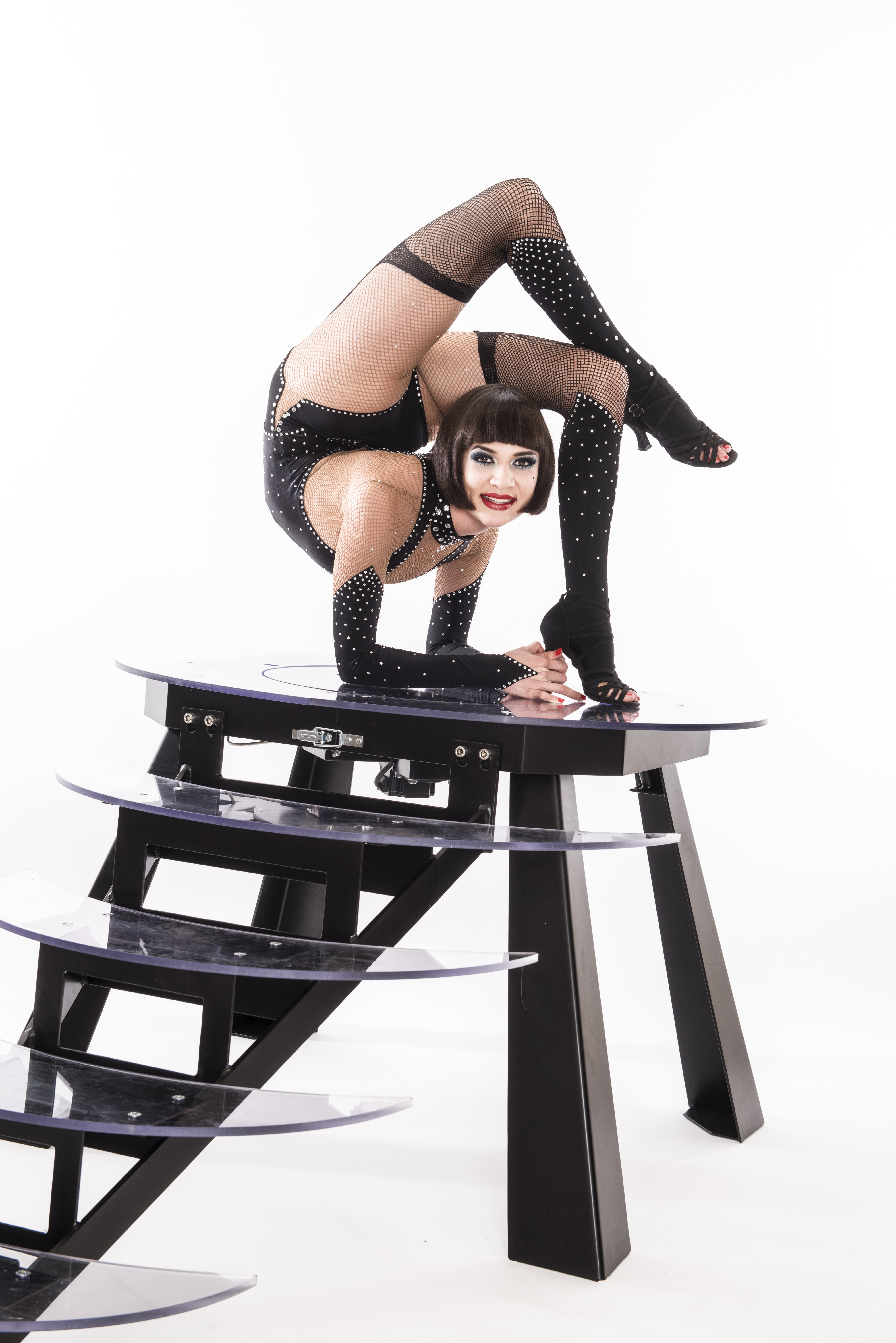 "Eliza" ist eine Kontorsionistin (Contortionist) aus Deutschland.